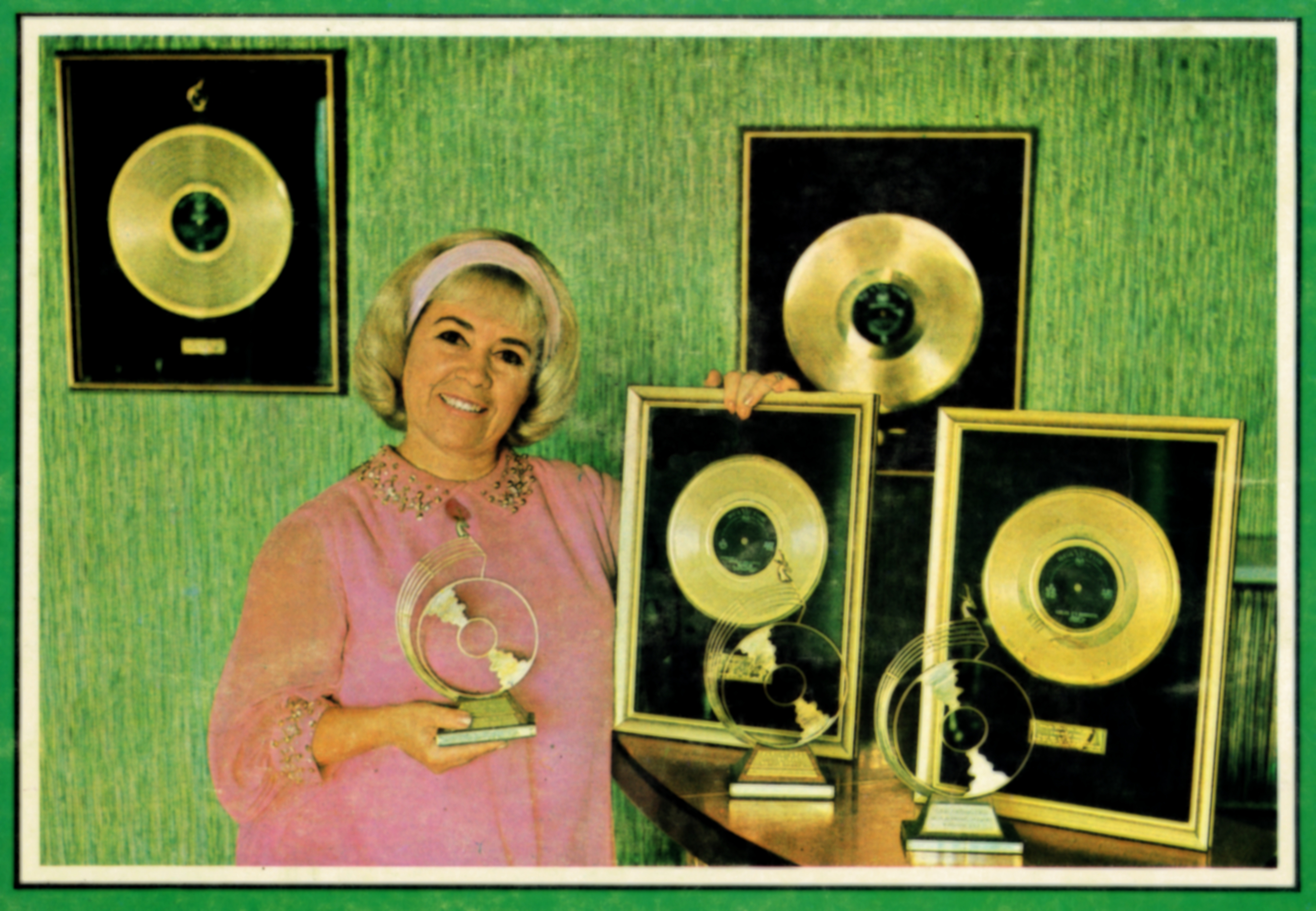 Virginia Lee met van haar goue plate.